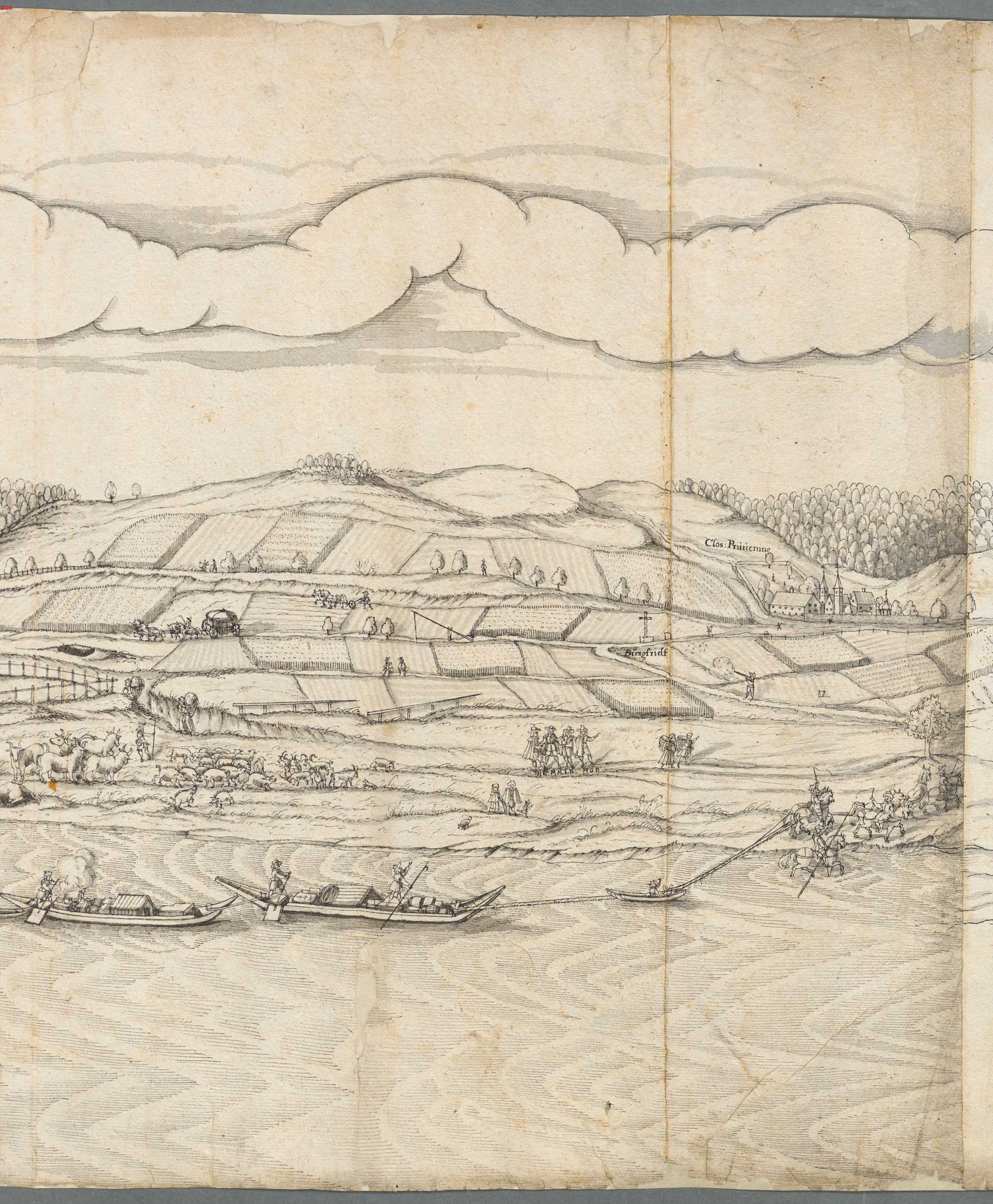 Abriß der Stadt Regensburg östlich und westlich der Steinernen Brücke. Keine Bezeichnungen